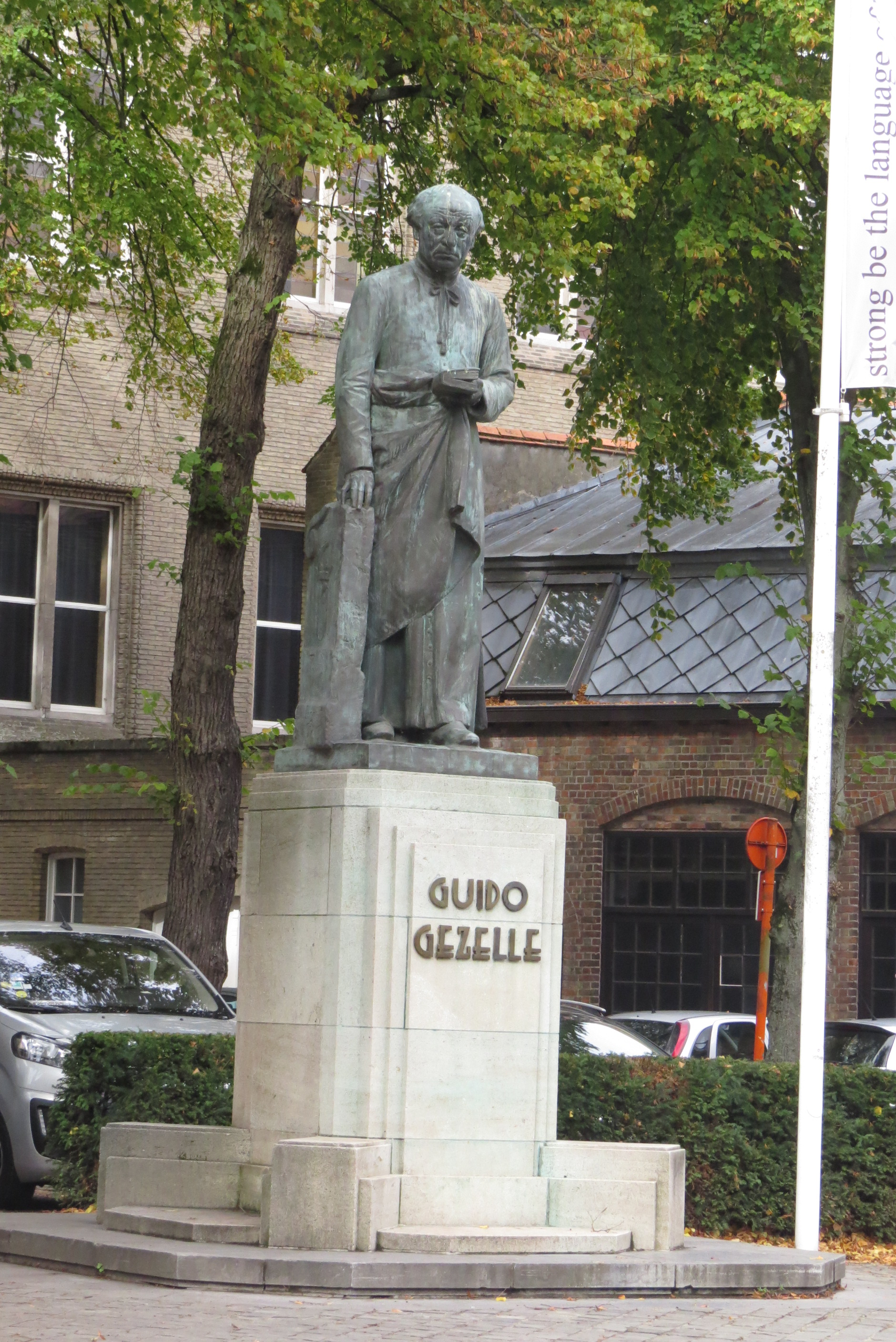 Stadt Brügge, Denkmal für Gezelle, im öffentlichen Straßenland